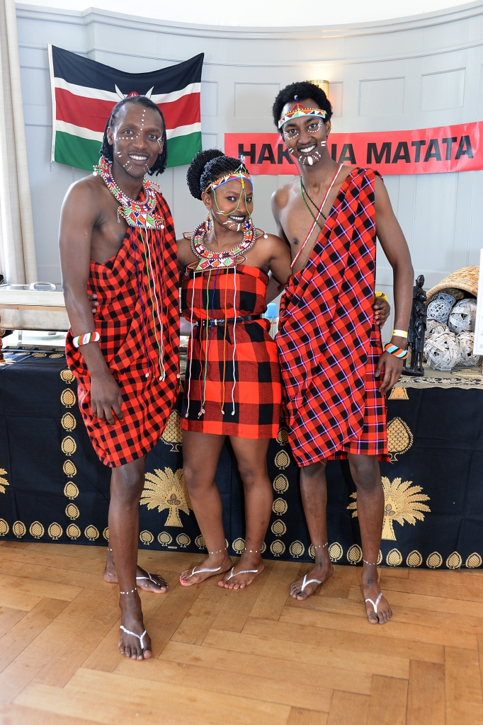 Studierende aus aller Welt präsentieren sich am internationalen Food Festival